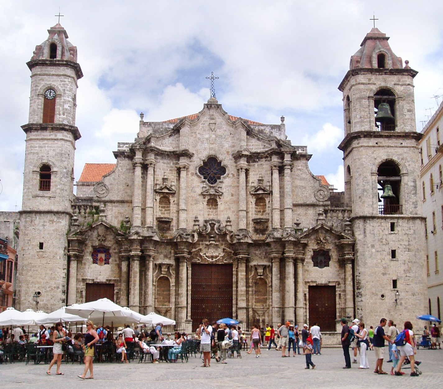 Havana Cathedral ( Catedral de La Habana) cropped